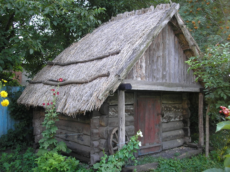 Village Prelesne. Ukraine. Donetsk region.